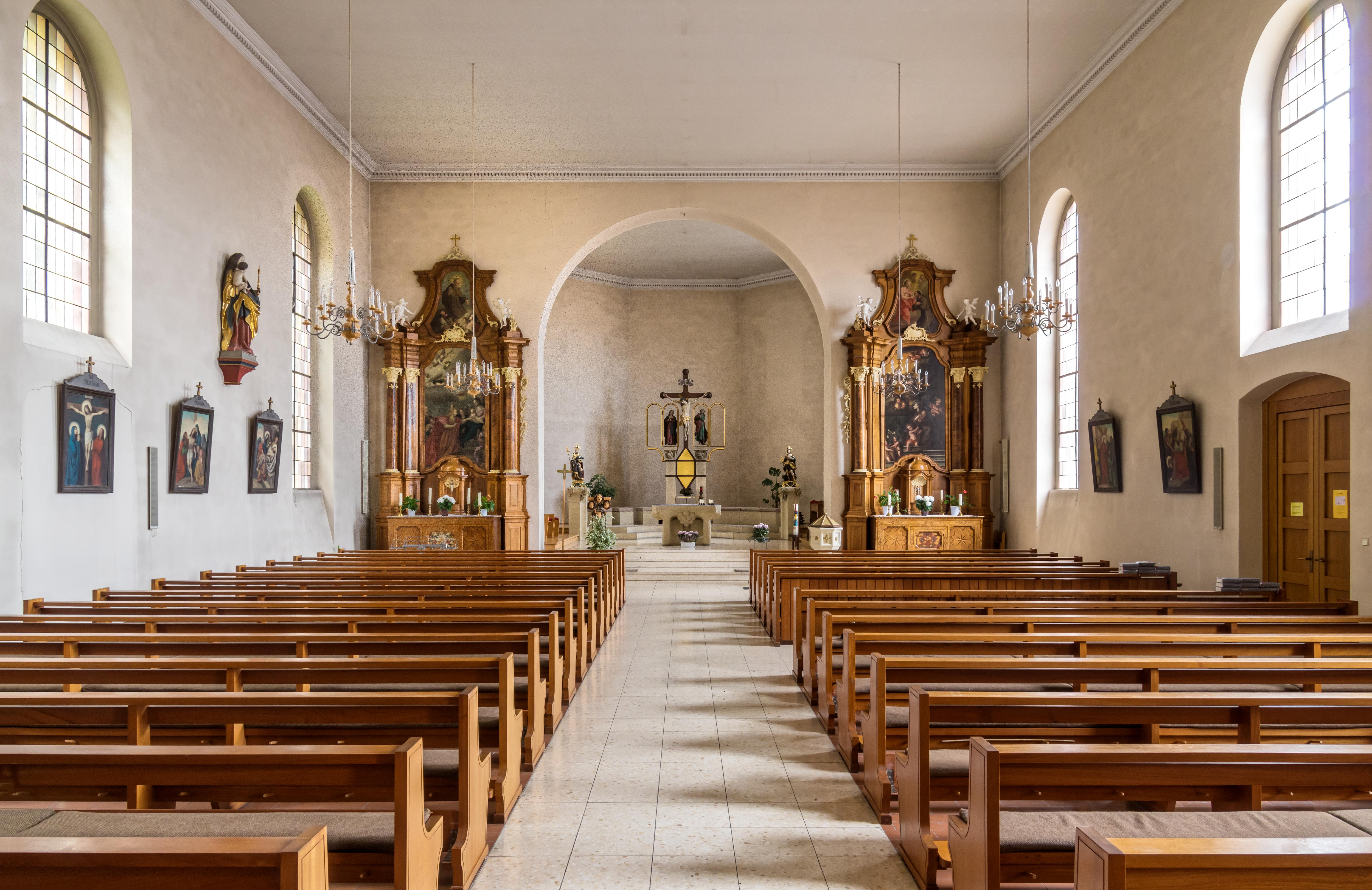 Bilder ausWasenweiler. Die katholische Kirche St. Mariae Himmelfahrt St. Mariae Himmelfahrt Bilder aus dem Innenraum Blick zum Altar